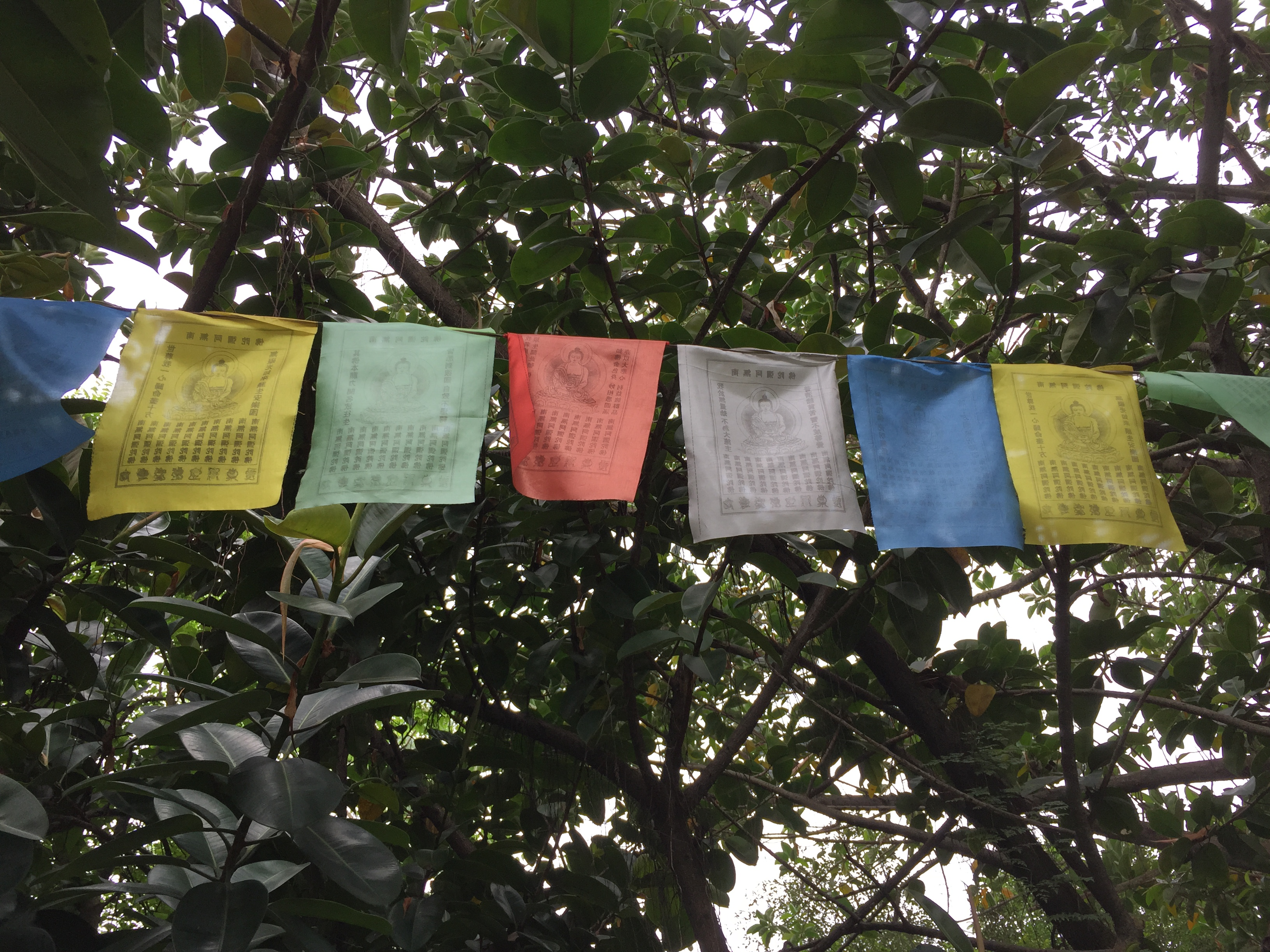 中文（中国大陆）: 潮州开元寺泰佛殿